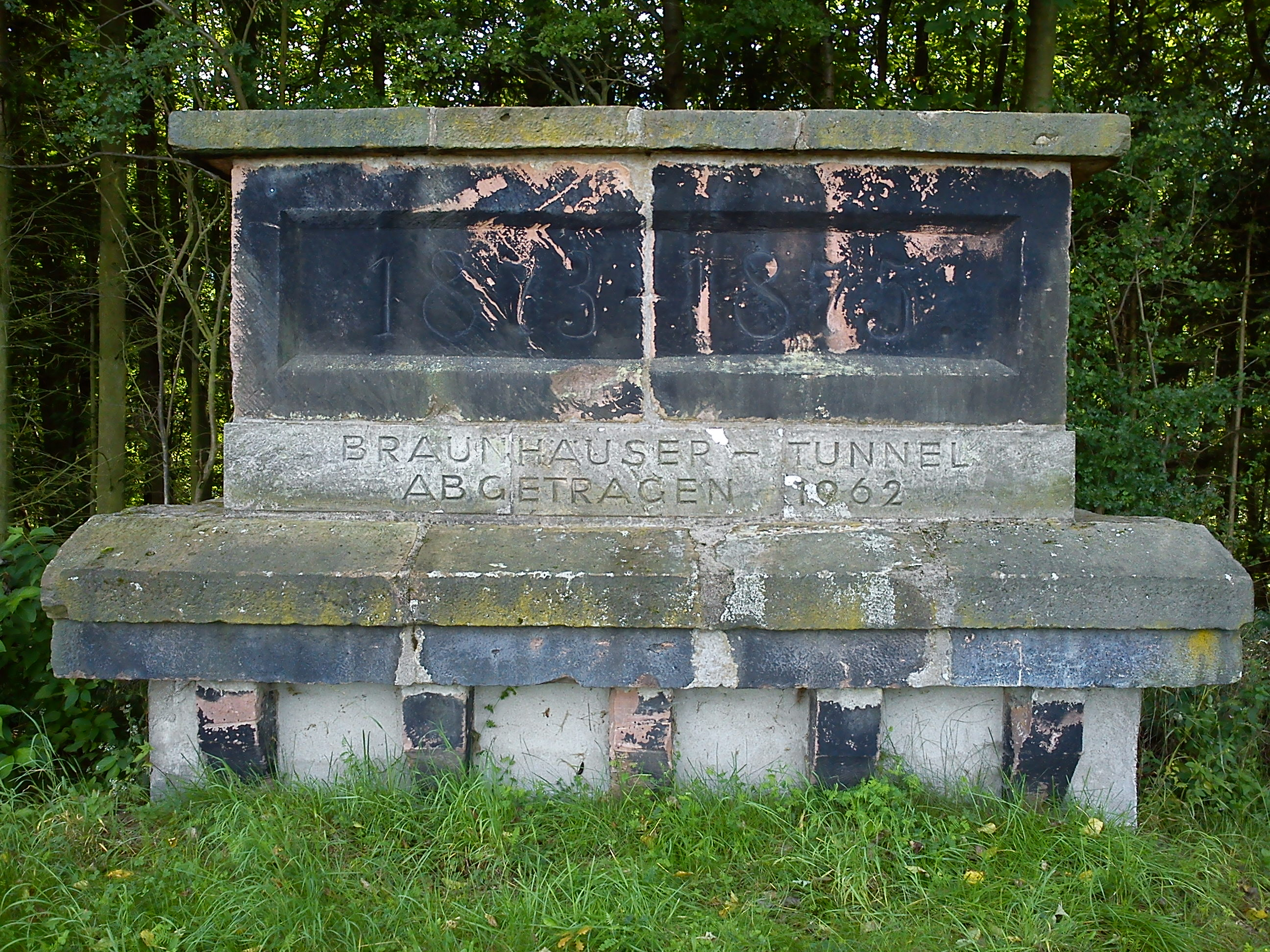 Eingangsstein des ehemaligen Braunhäuser Tunnels bei Bebra-Braunhausen.